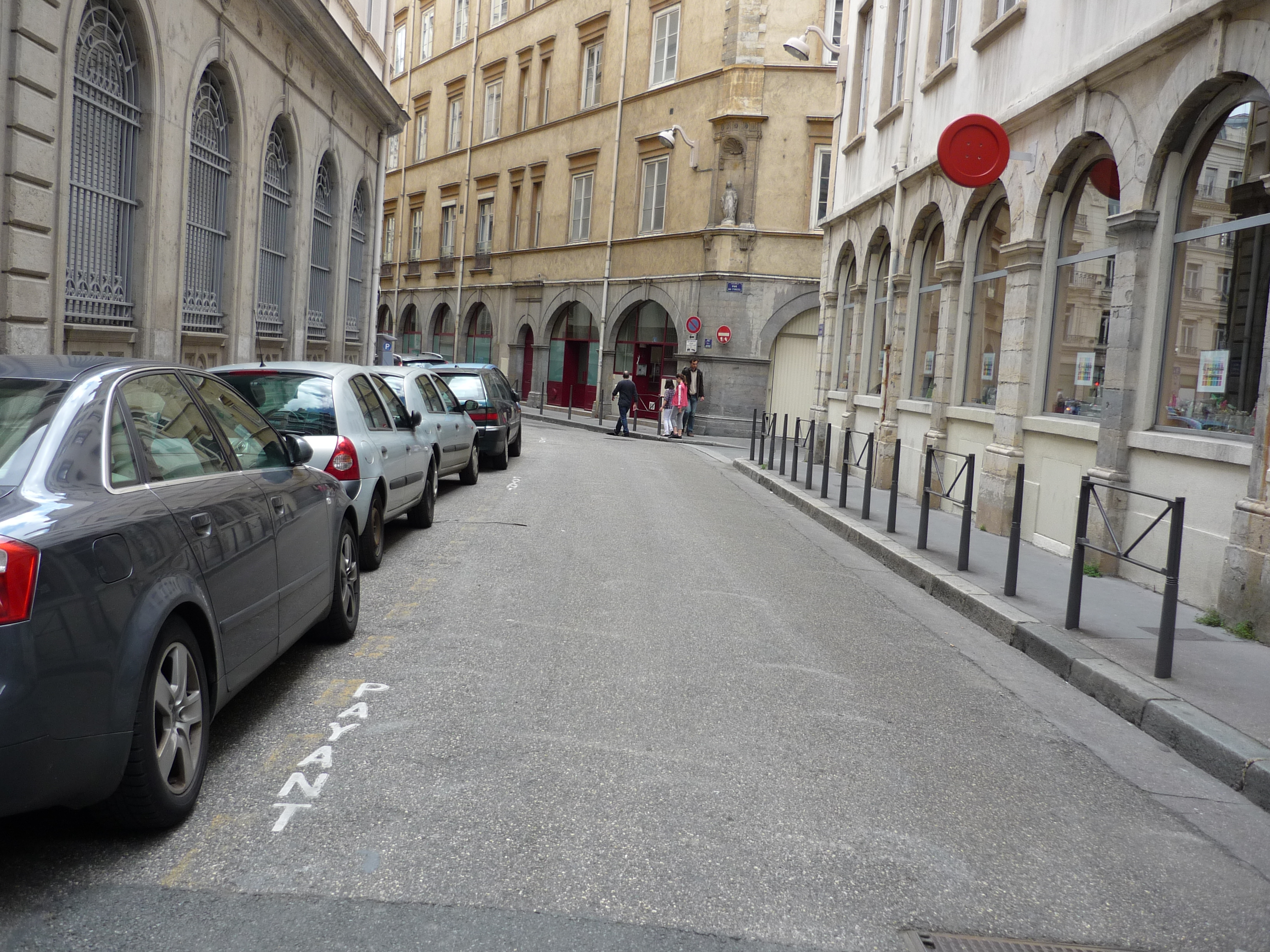 Rue de la Gerbe à Lyon, dans le 2e arrondissement